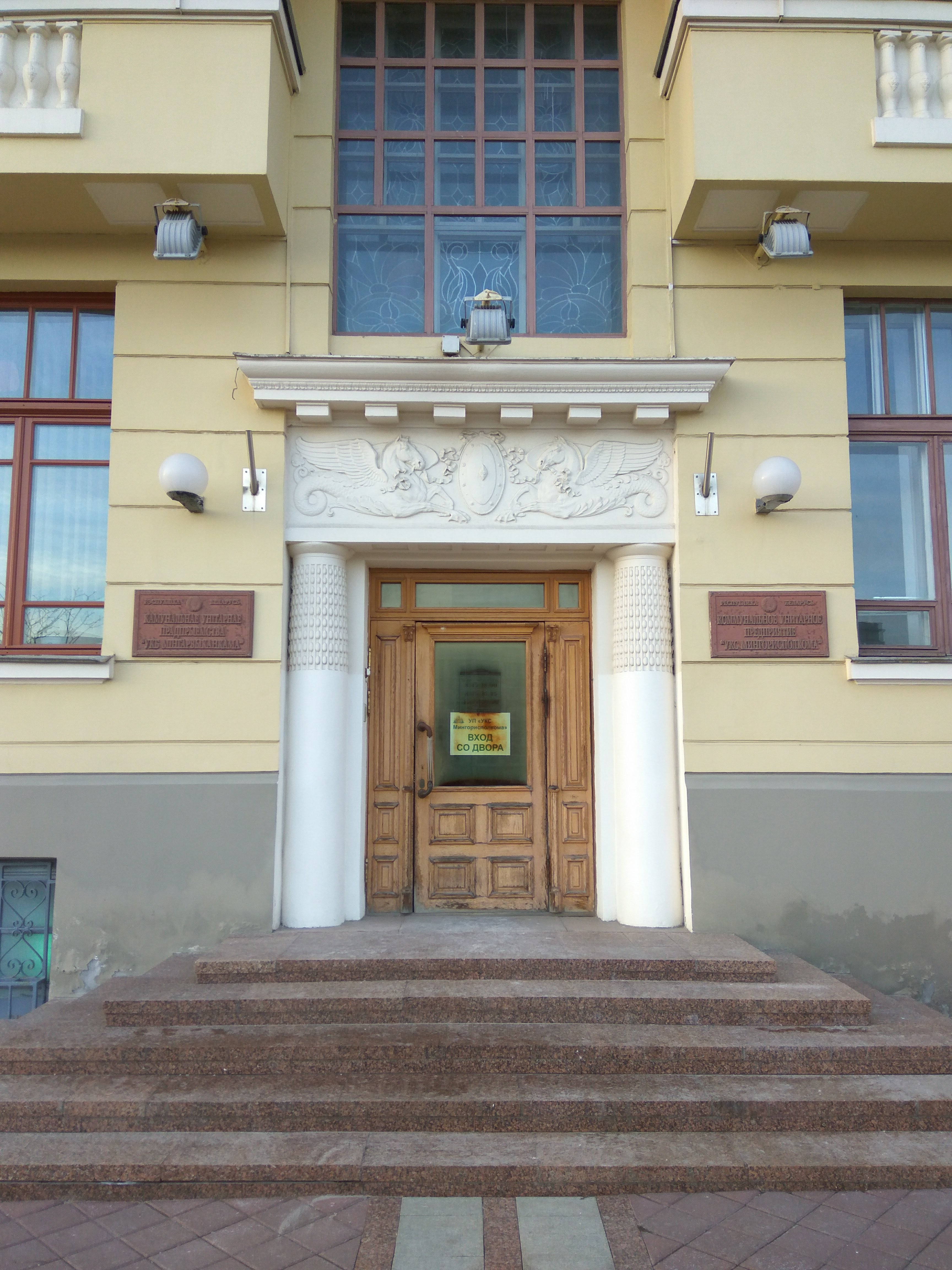 Мінск. Савецкая вуліца (плошча Незалежнасці)